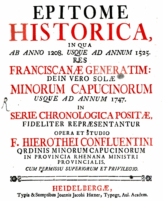 Hierotheus Confluentinus, Kapuzinerchronist, Buchtitelblatt 1750